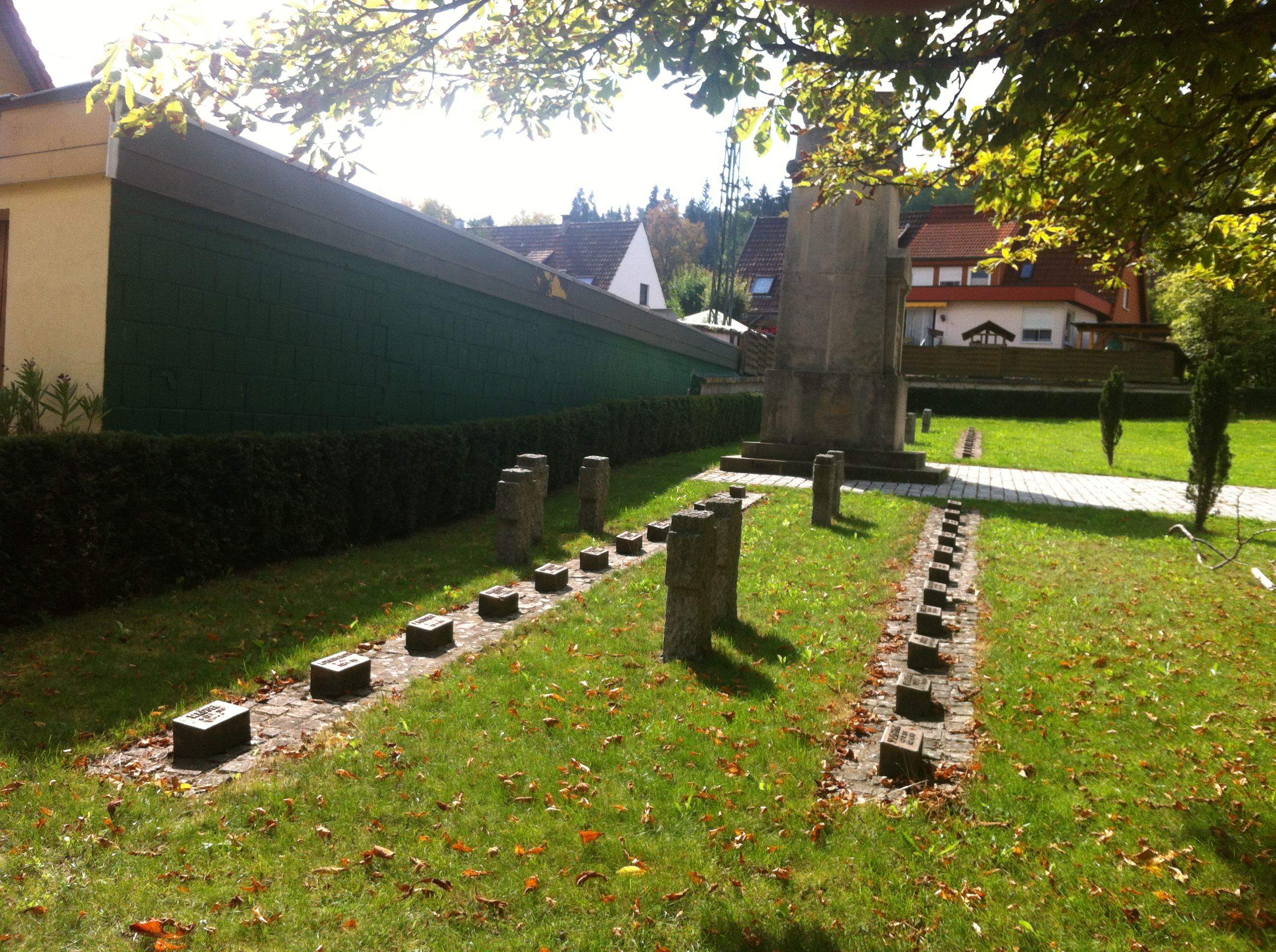 BB Grabplatten von bei Kämpfen im Raum Blumberg im April 1945 gefallenen deutschen Soldaten. Mahnmal bei der Evangelischen Kirche.